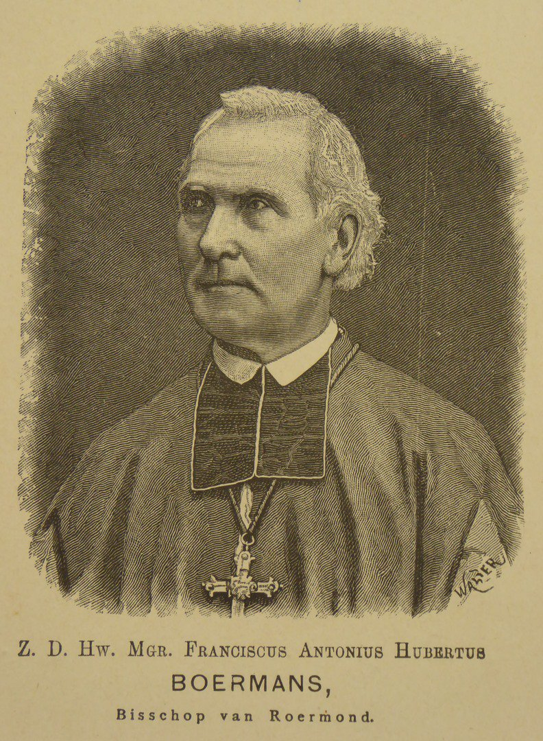 Mgr. F. A. H. Boermans, bisschop van Roermond, gravure J. Walter (coll. Catharijne Convent)